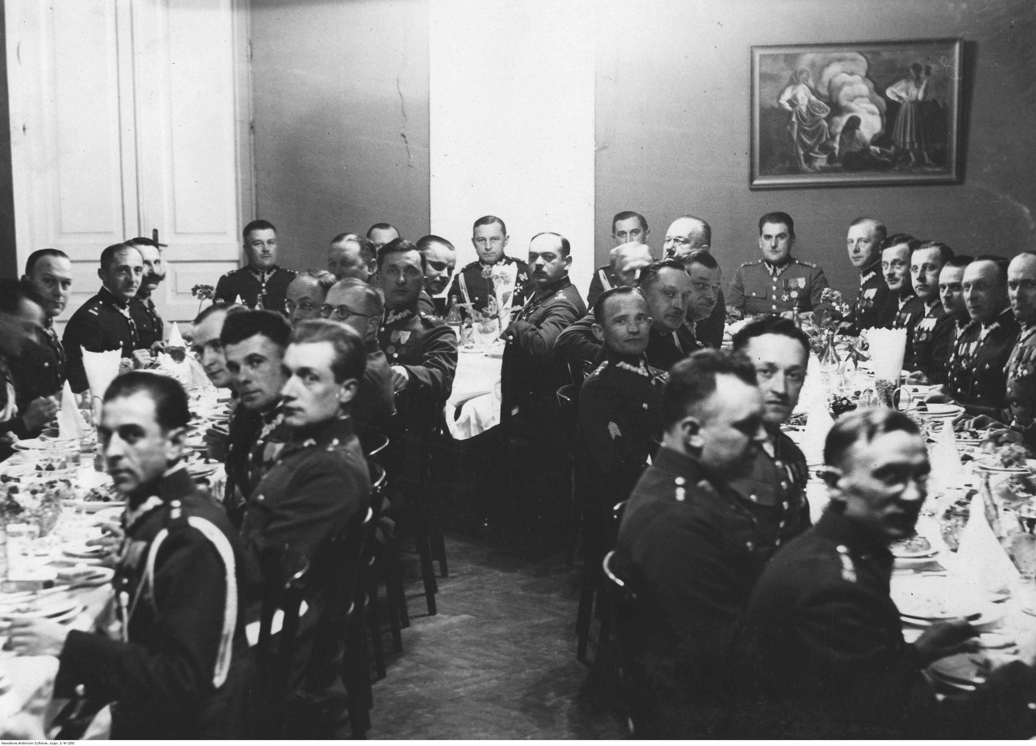 Pożegnanie szefa sztabu dowództwa KOP-u ppłk Witolda Kirszenszteina, nowo mianowanego na zastępcę dowódcy 10 pułku piechoty, w kasynie oficerskim w Warszawie; 2 kwiecień 1932 r. Wśród uczestników uroczystości widoczni m.in.: dowódca KOP-u gen. brygady Jan Kruszewski (w środku), ppłk Witold Kirszensztein (pod ścianą, z prawej gen. Kruszewskiego). Koncern Ilustrowany Kurier Codzienny - Archiwum Ilustracji. Sygnatura: 1-W-200